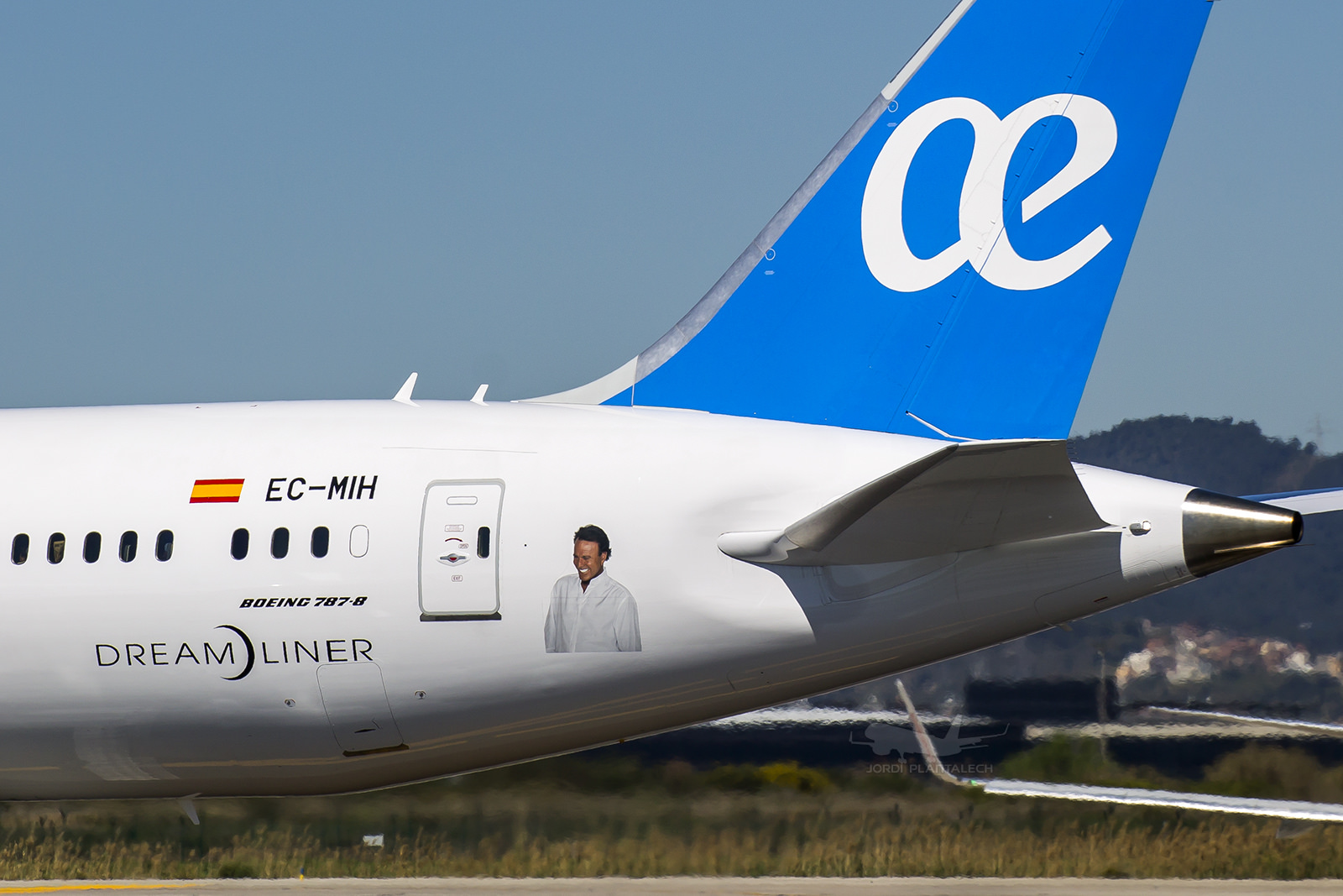 "... y lo sabes."